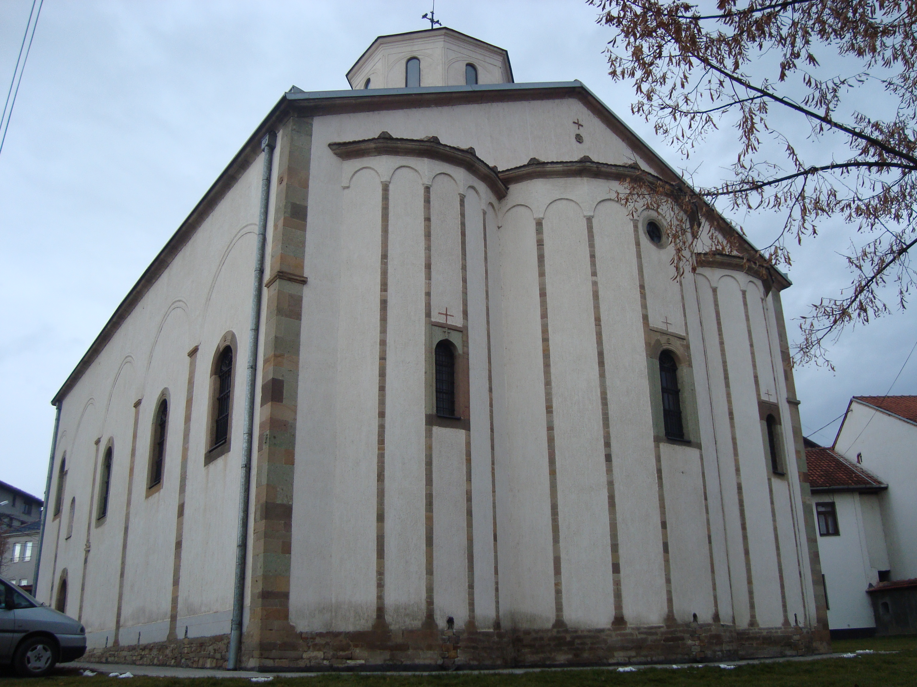 Црква Светог Николе, Нови Пазар, поглед са источне стране, изграђена 1871. године.